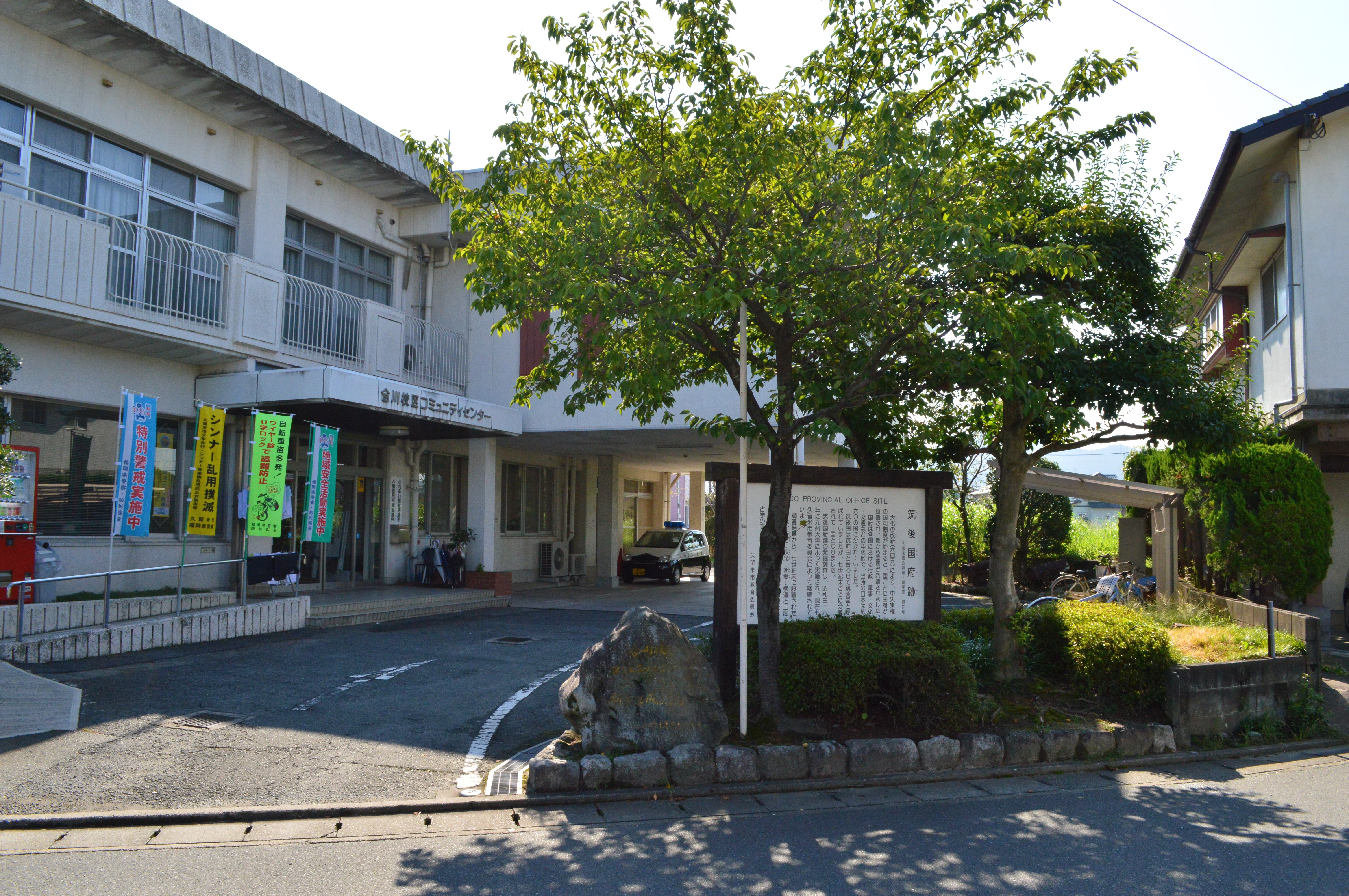 筑後国府跡説明板 (合川校区コミュニティセンター前)